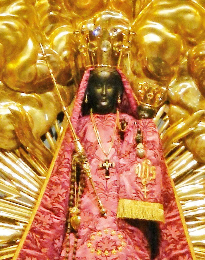 Schwarze Madonna von Einsiedeln, mit Kind. Steht in der Klosterkirche von Einsiedeln in der Schweiz. Liegt an einem Weg der Jakobspilger.